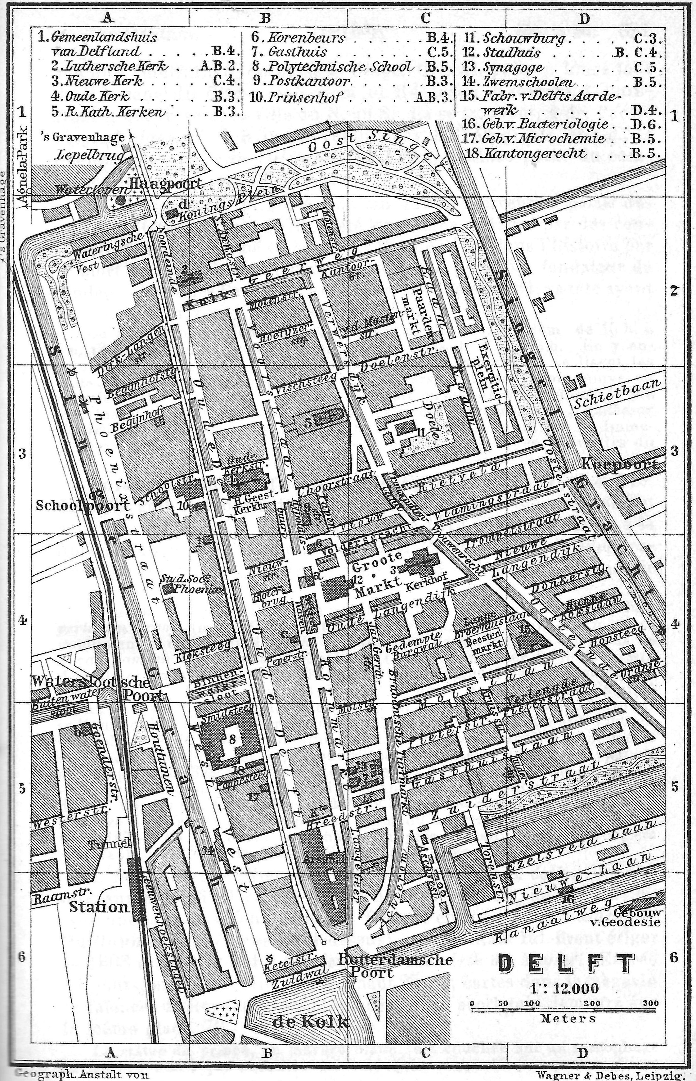 Baedeker 1905 kaart van Delft. Te zien is dat de vroegere tram niet de huidige route langs het spoor en kanaal volgt. Nr 8 is de polytechnische school, de latere TU Delft